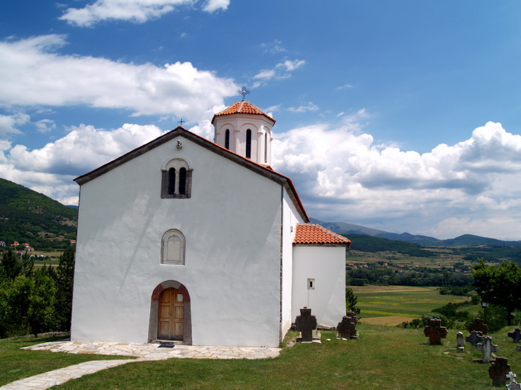 Manastir Končul u blizini Raške (grada). Posvećen Svetom Nikoli i u narodu poznatiji kao Nikoljača.